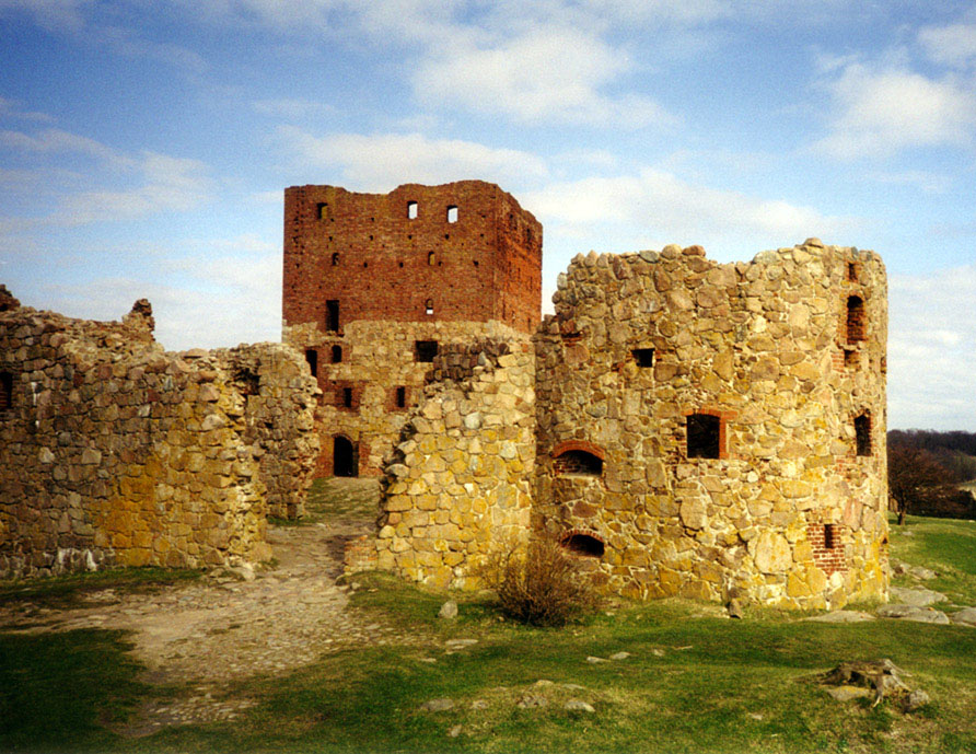 Ruine der Burg Hammershus auf Bornholm originally uploaded on de.wikipedia by Benutzer:Darkone at 23:46, 7. Nov 2004. Filename was Burg Hammershus 5.jpg.